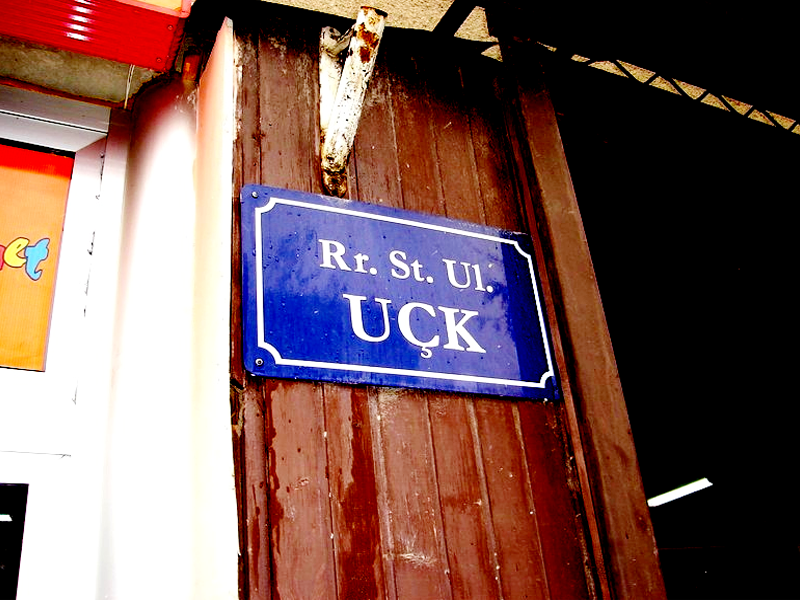 Eine Strasse in Prishtina mit dem Namen Uçk